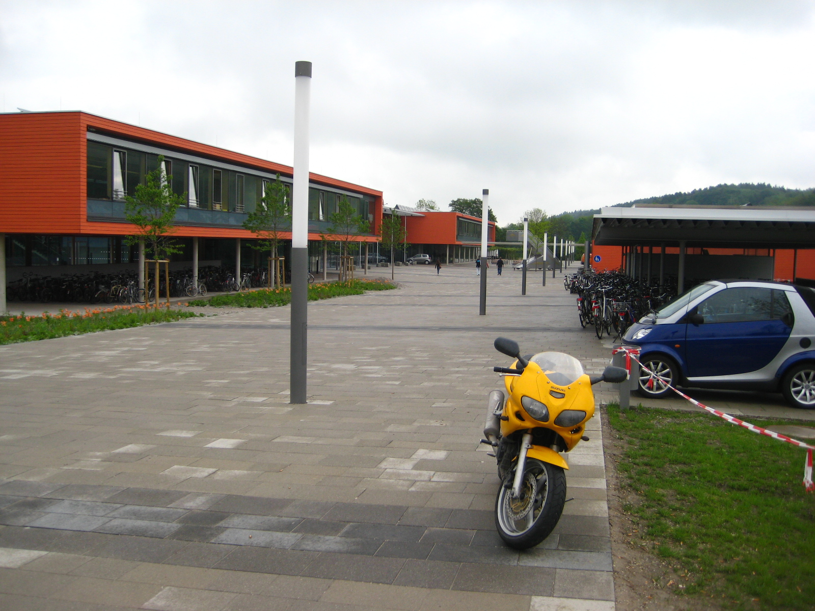 Fürstenfeldbruck, Gemeinsamer Eingangsbereich für GRG, FOS/BOS